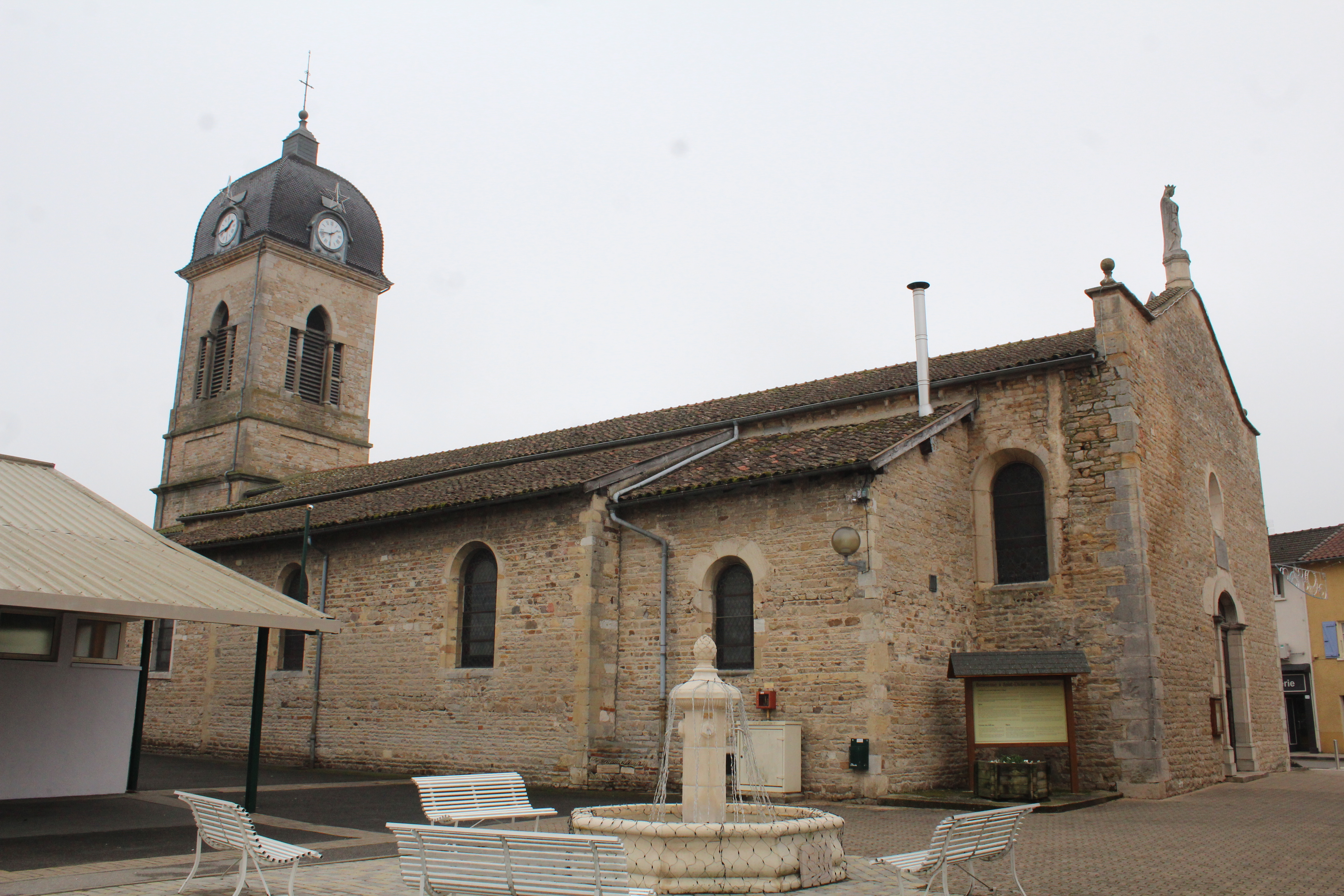 Église Saint-Didier de Saint-Didier-sur-Chalaronne.